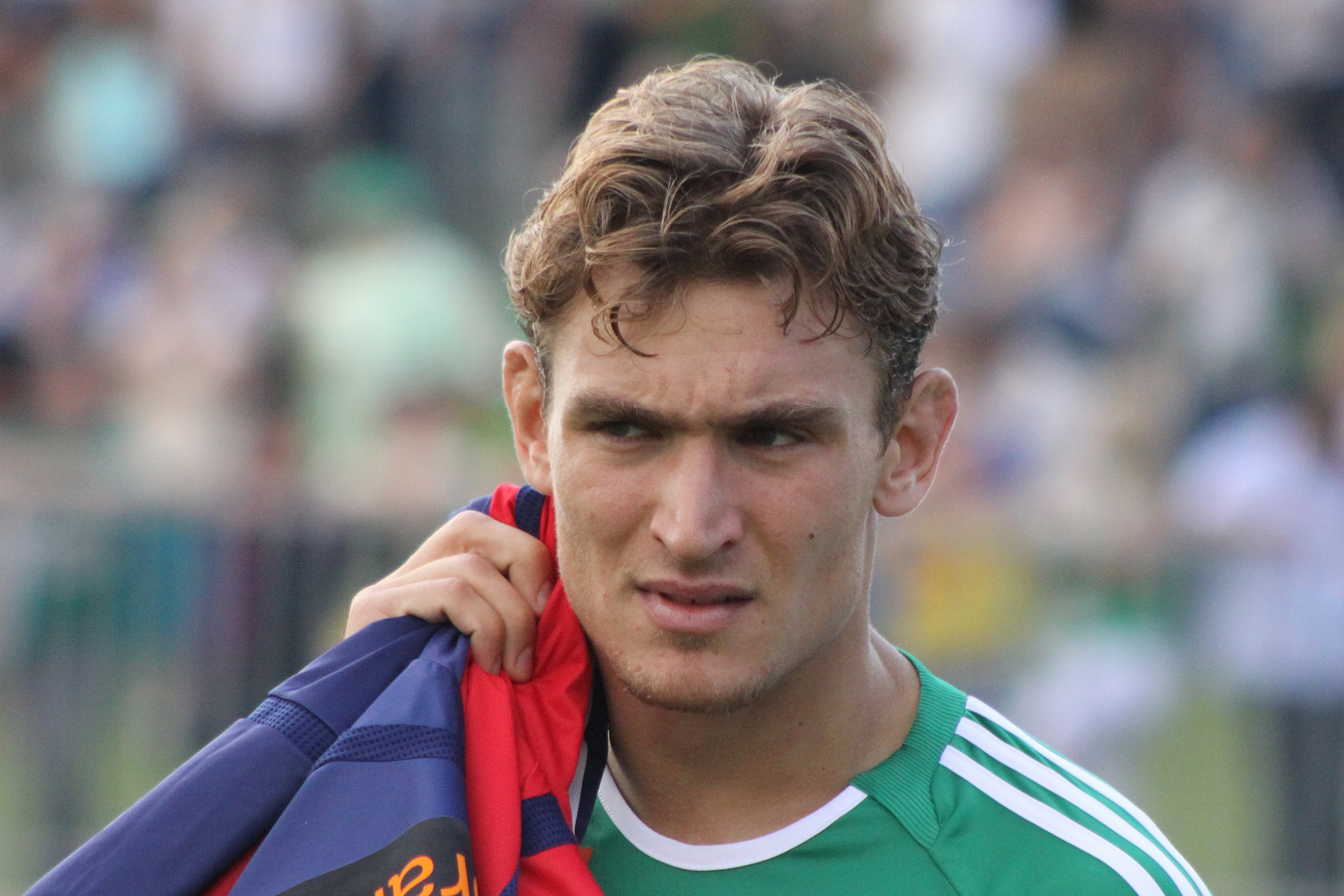 Nikica Jelavić - SK Rapid Wien (2)